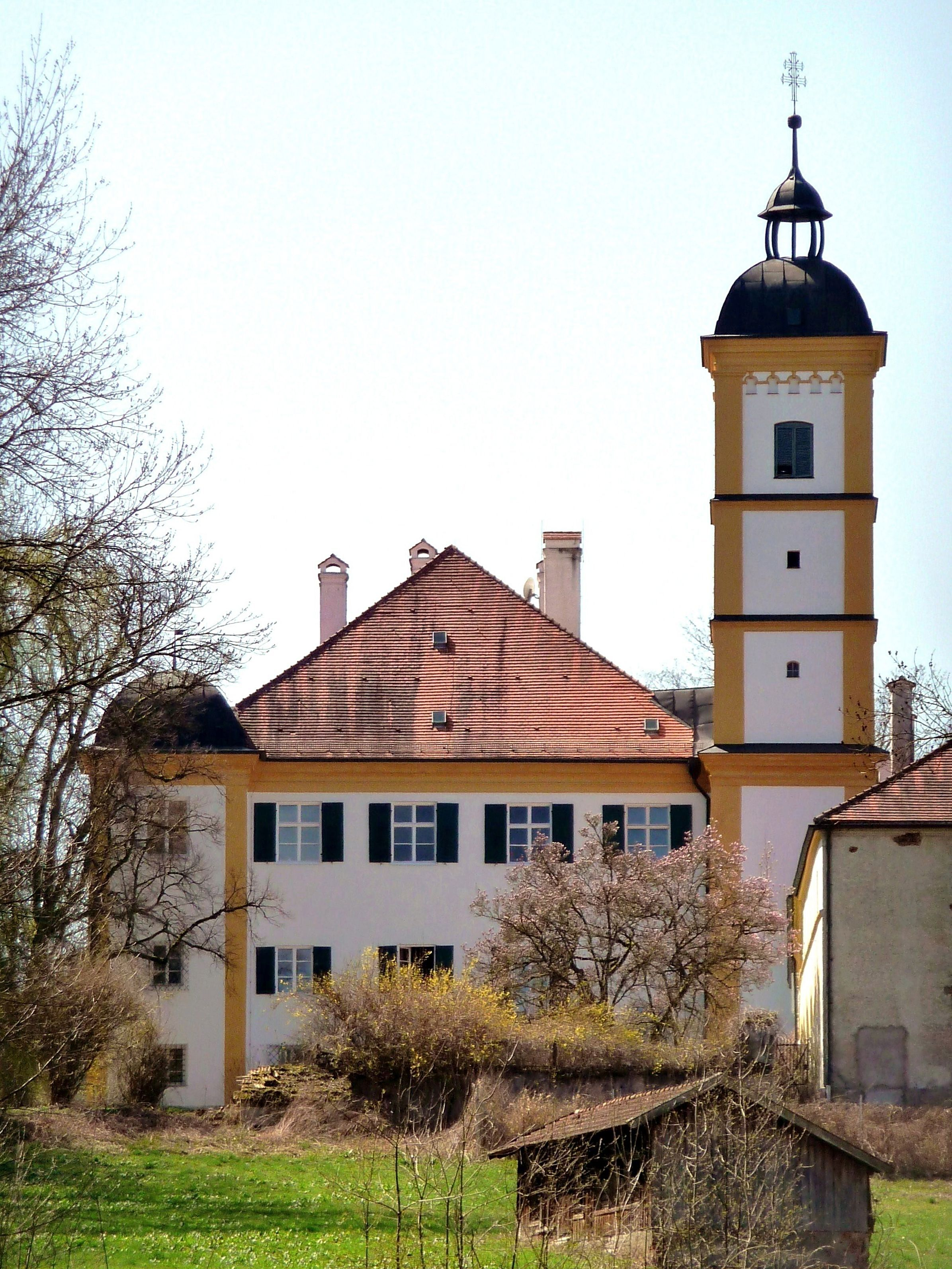 Schloss Kleeberg